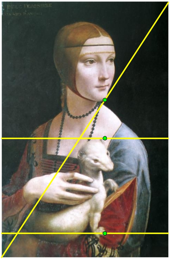 Der Goldene Schnitt im Gemälde "Dame mit dem Hermelin" von Leonardo da Vinci